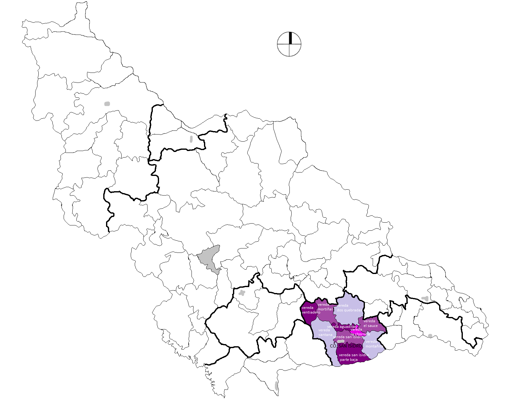 Veredas de San Isidro, Santa Rosa de Osos